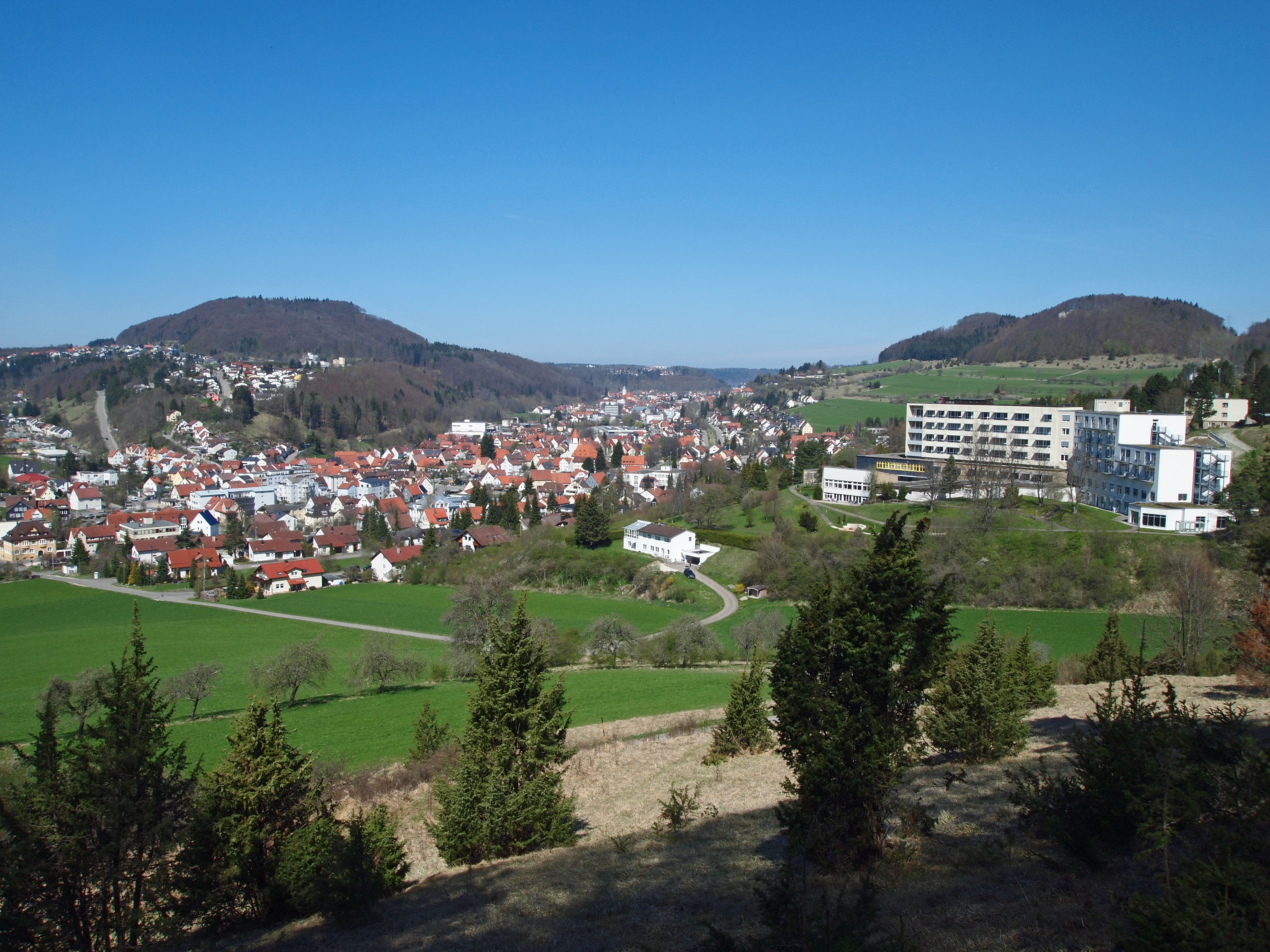 Truchtelfingen